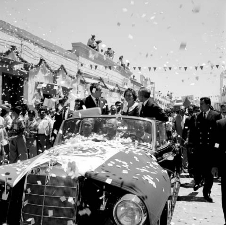 Lugarː Dolores Hidalgo, Guanajuato, México Fechaː 15 de septiembre de 1960 Ubicaciónː Fototeca Nacional